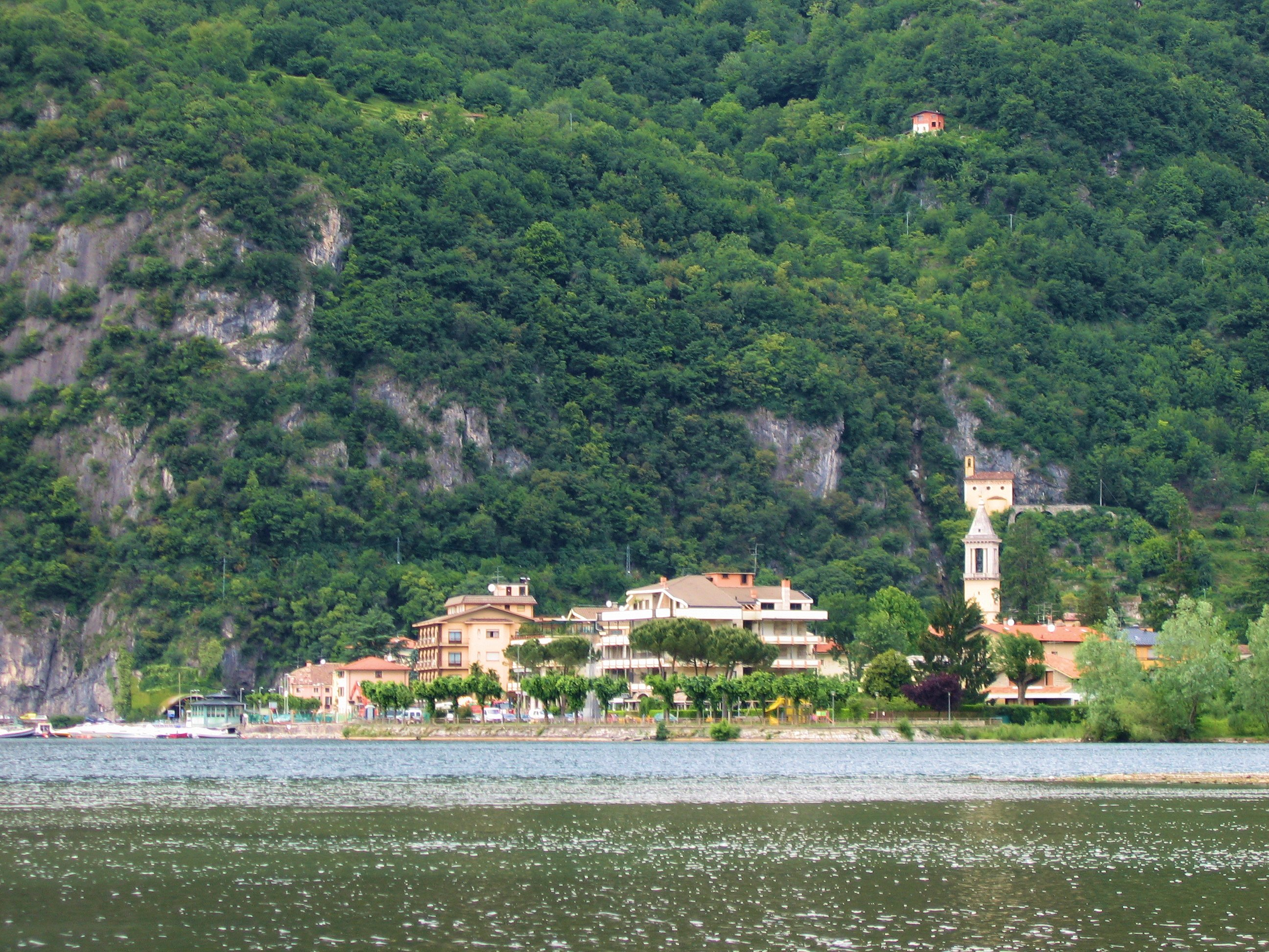 Porlezza